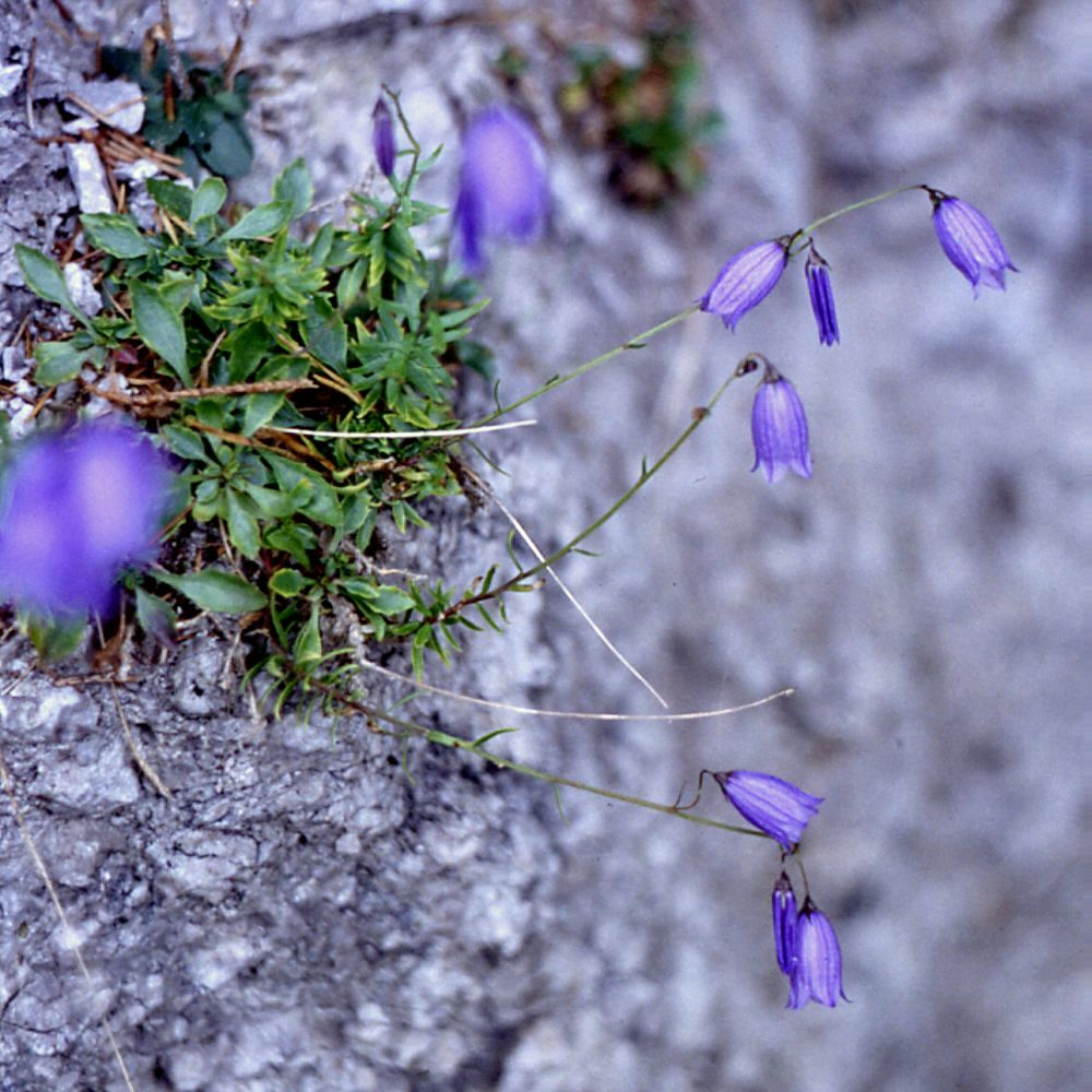 Rasen-Glockenblume (Campanula cespitosa Scop.), Glockenblumengewächse (Campanulaceae) - Österreich/Austria/Autriche: Niederösterreich, Südfuß der Reisalpe, beim Stadler